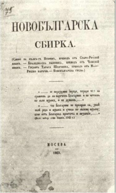 Новобългарска сбирка